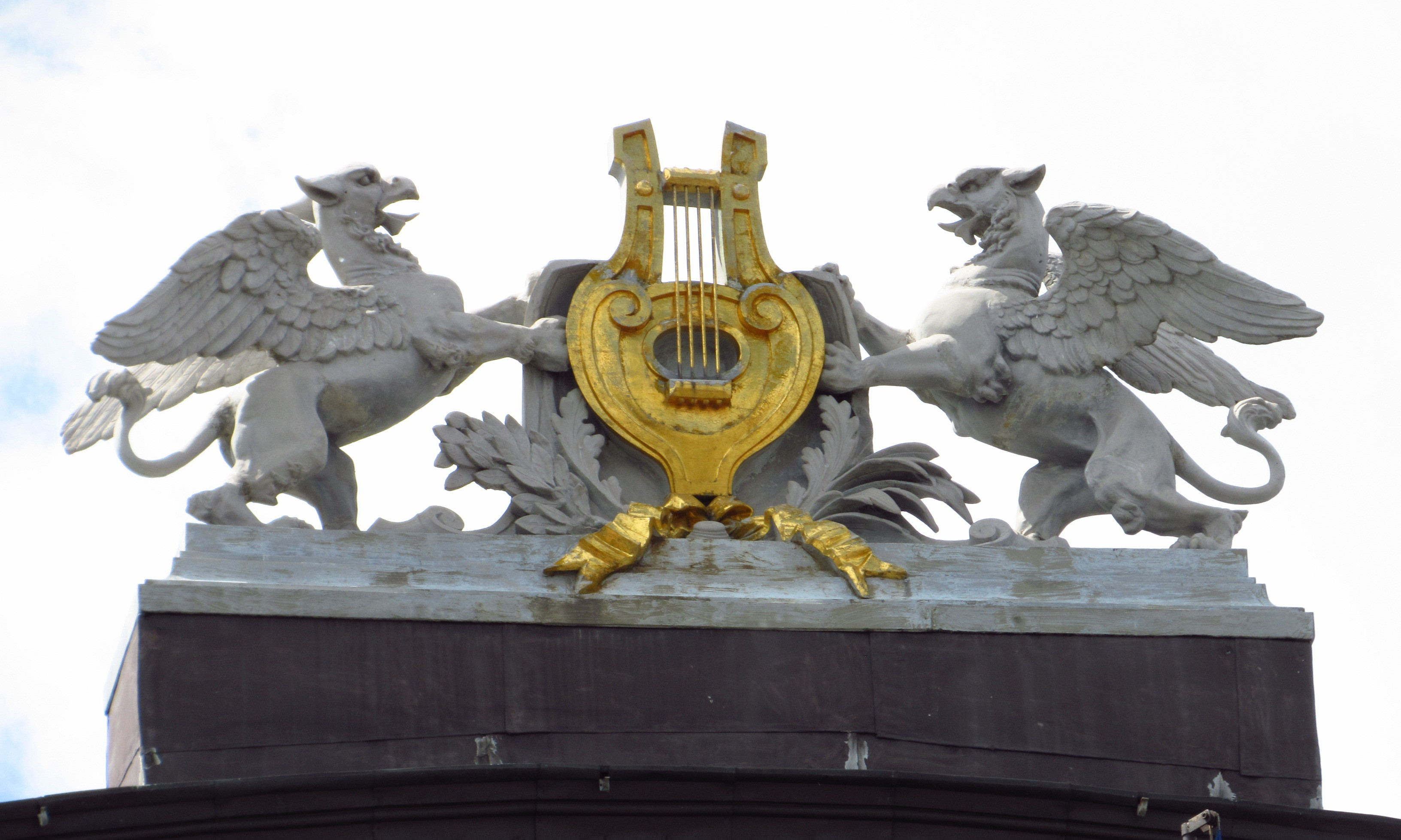 Театр міський (Національна опера України ім. Т. Г. Шевченка), де у 1911 р. було смертельно поранено П. А. Столипіна; 1917 р. на II Всеукраїнському військовому з'їзді було проголошено І Універсал Центральної Ради, Київ, Володимирська вул., 50